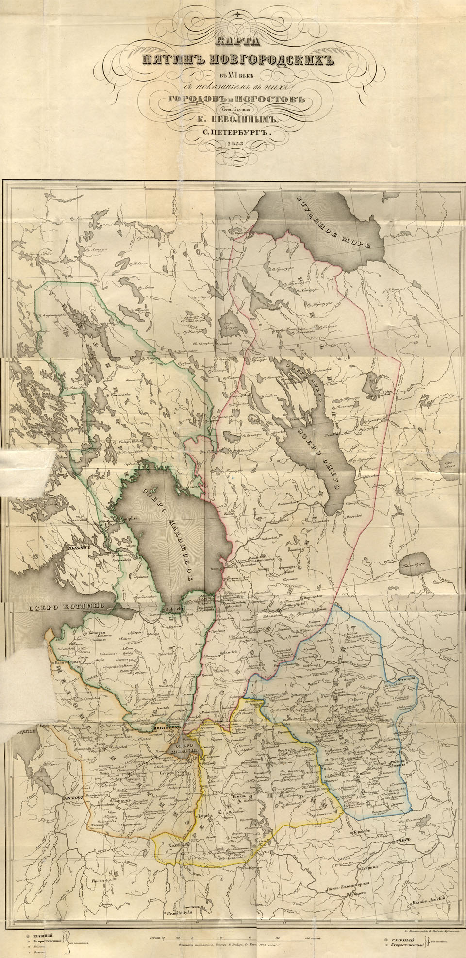 Изображение | Описание = Карта Пятин Новгородских в XVI веке Пятины Новгородской земли | Автор = К.А. Неволин | Время создания = 1853 | Источник = Неволин К.А. О пятинах и погостах новгородских в XVI веке, с приложением карты Спб: Тип. императорской Академии Наук,1853. | Лицензия = PD-old